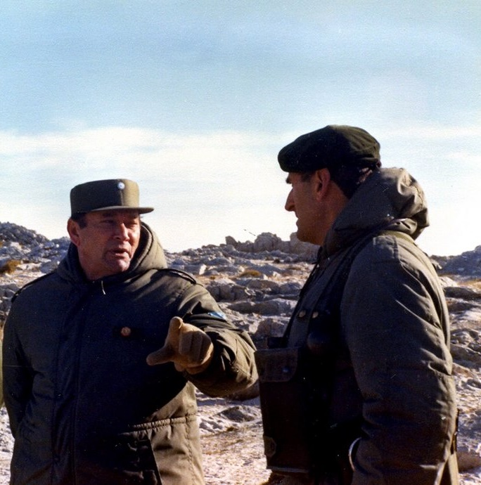 General de Brigada Américo Daher dando indicaciones al Teniente Coronel Mohamed Alí Seineldín.